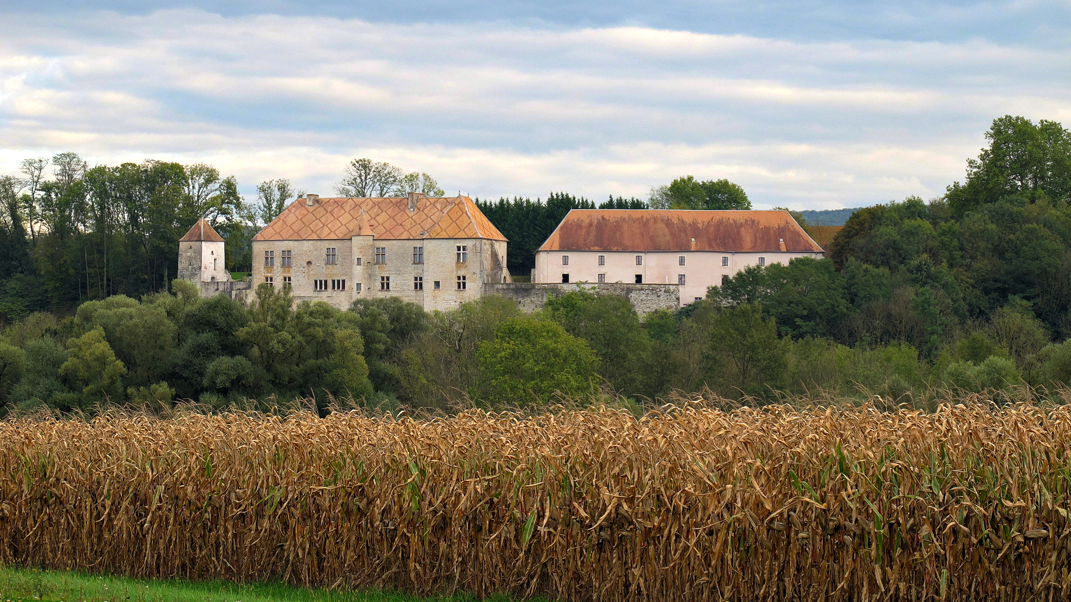 Château de La Roche (Inscrit) .